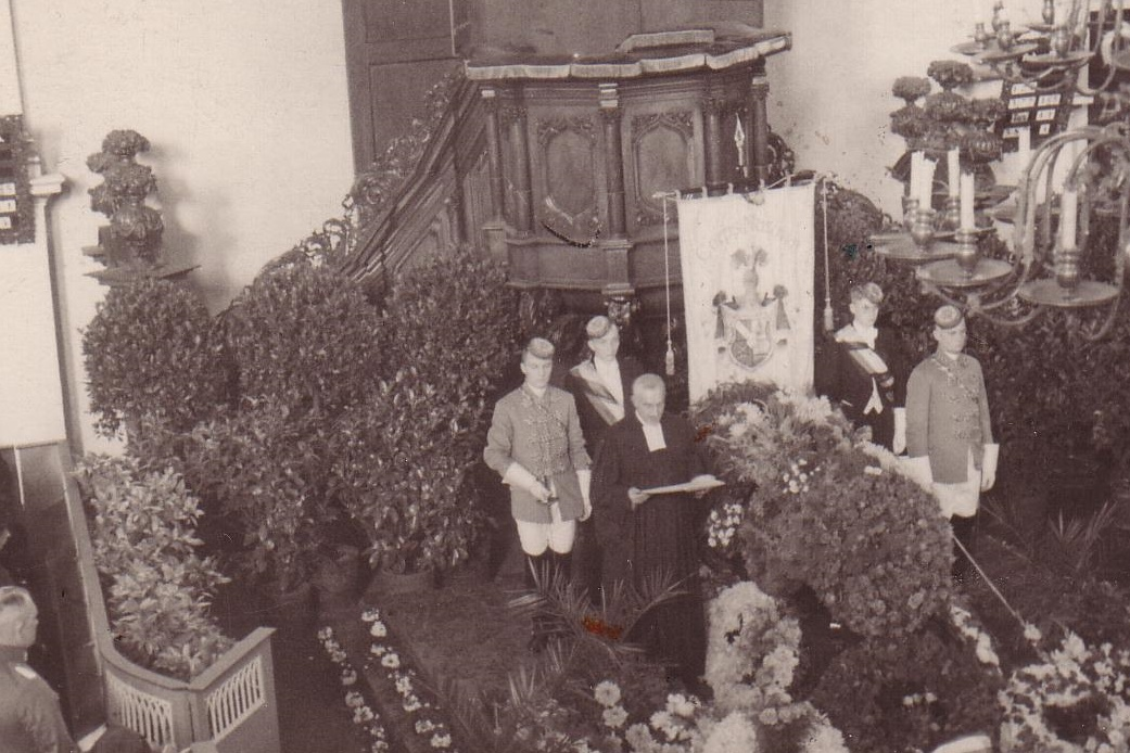 Fotografie der Begräbnisfeier von Pfarrer Paul Thomaschki mit zwei Chargierten und zwei Füchsen des Corps Masovia in der Königsberger Burgkirche am 27. Juli 1934